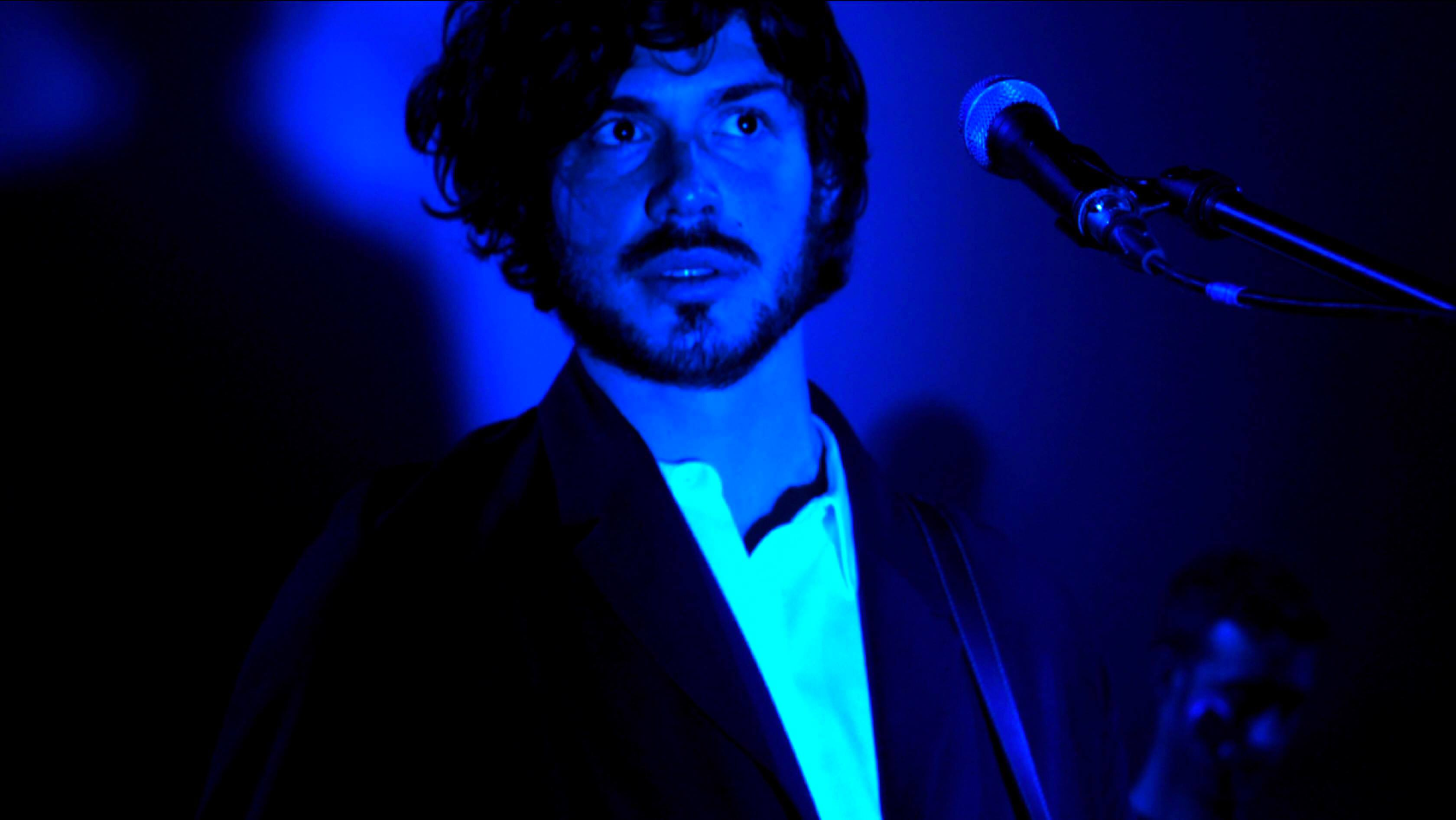 Gael Faure - 2017